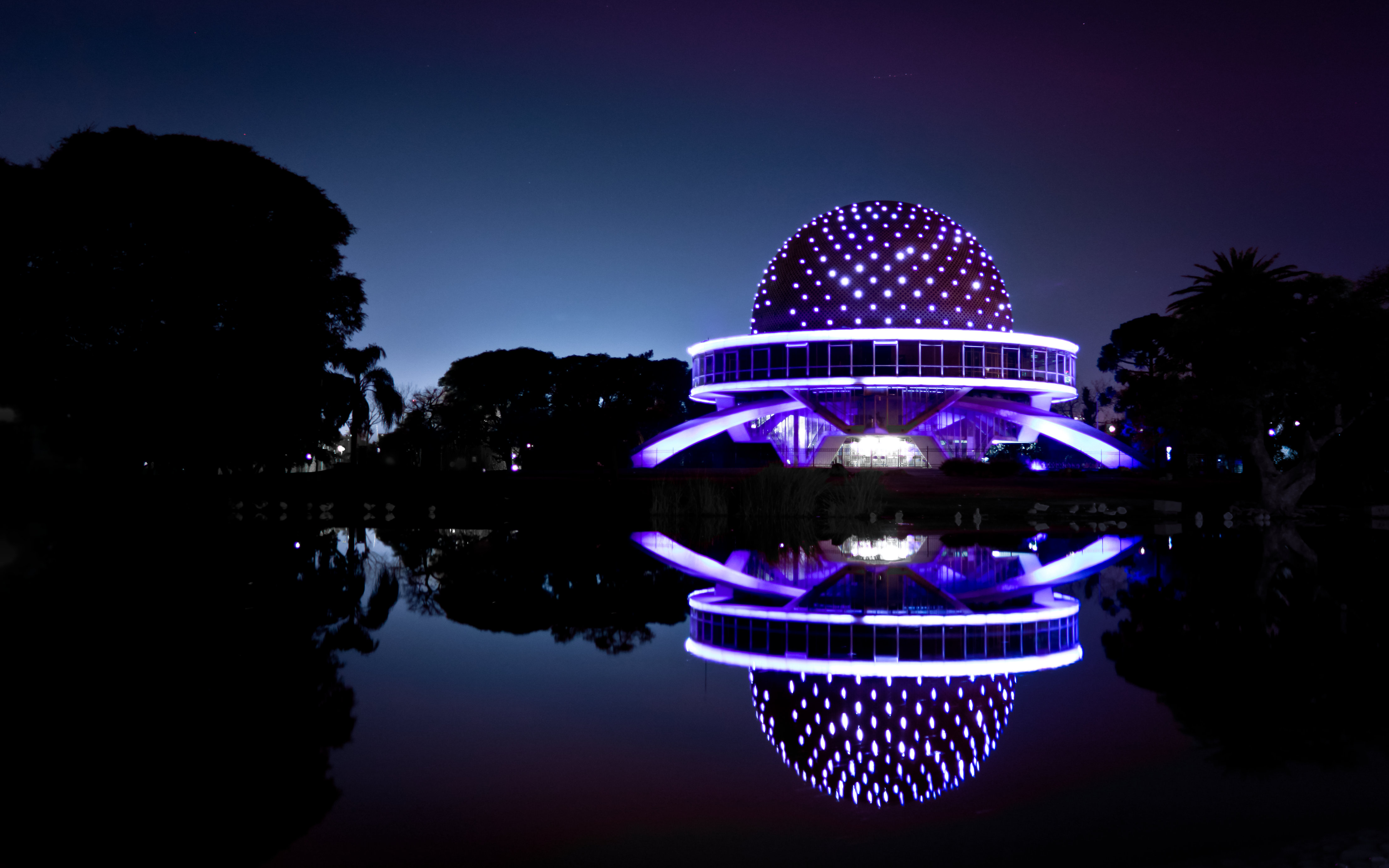 Planetario de la Ciudad de Buenos Aires